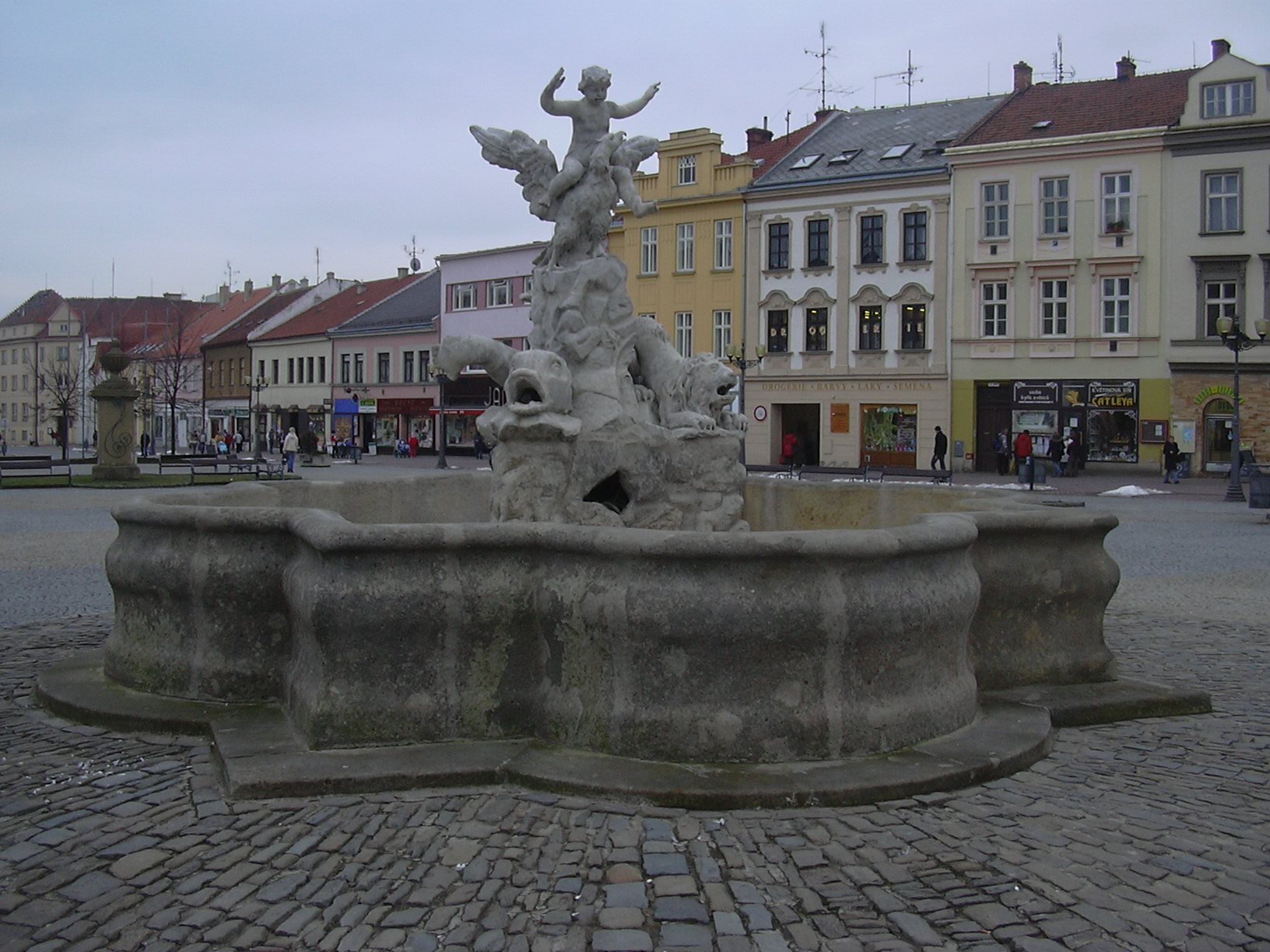 Kašna na náměstí (Vyškov- czech republic)